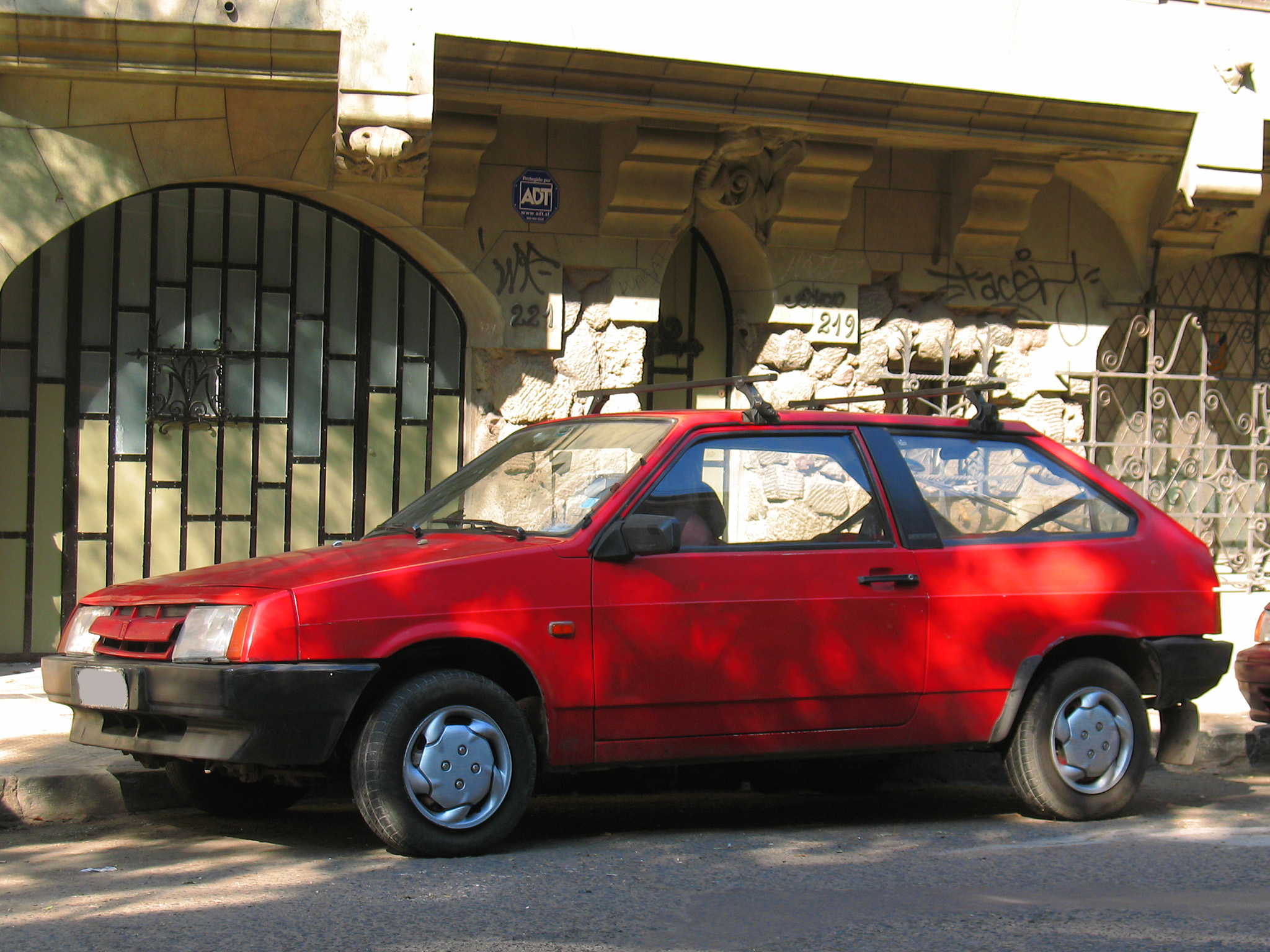 Lada Samara 1300 1993